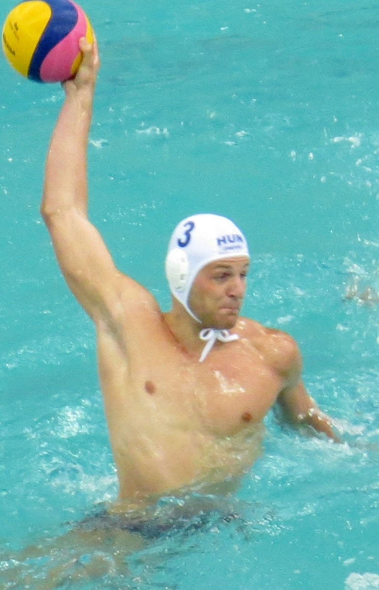 Rio 2016. Polo aquatico. sx50 67